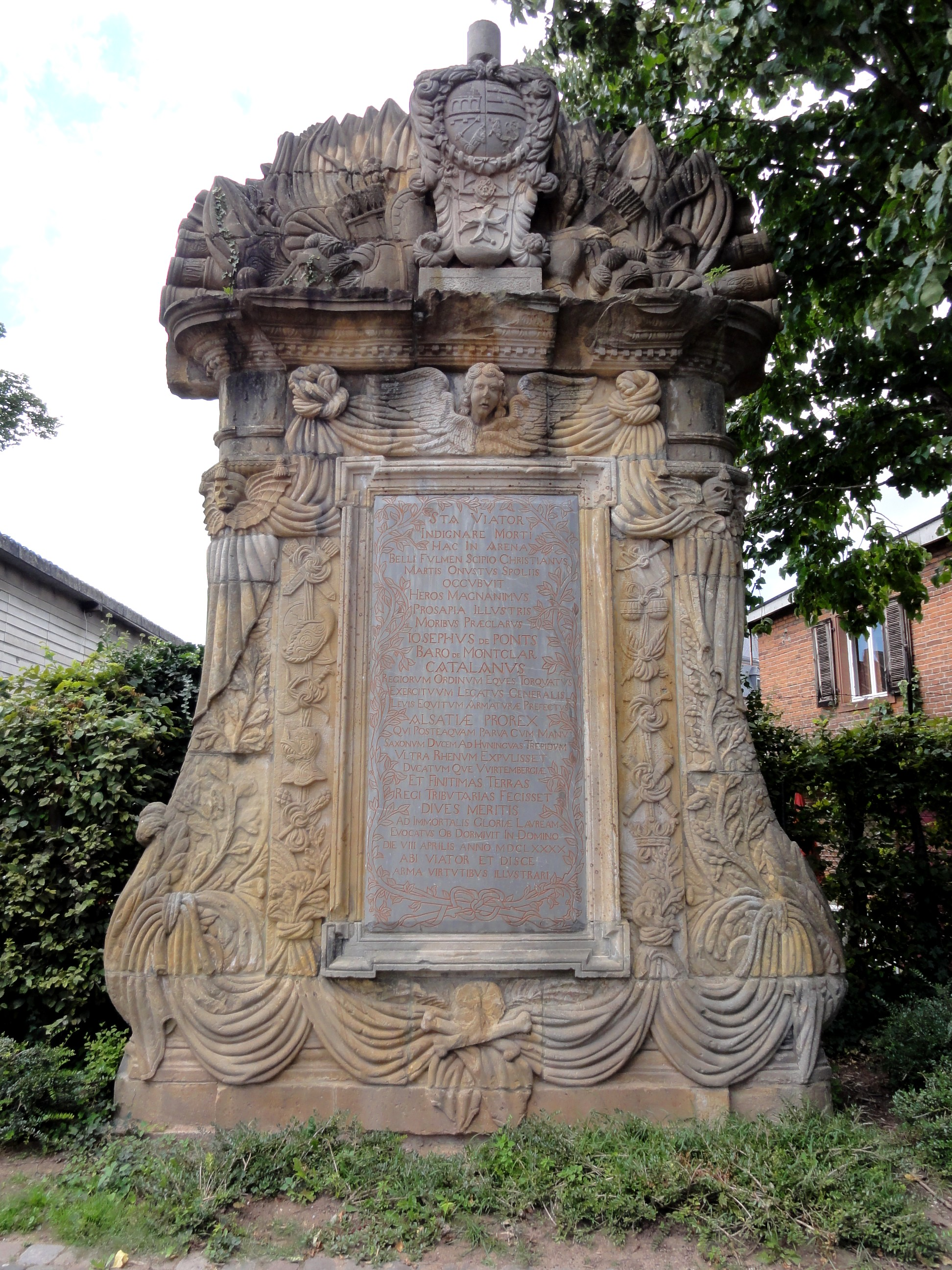 Rheinland-Pfalz, Landau in der Pfalz, Obertorplatz, an Nr. 4, Stèle de Joseph de Pons et de Guimera, Baron de Montclar (1625-1690)